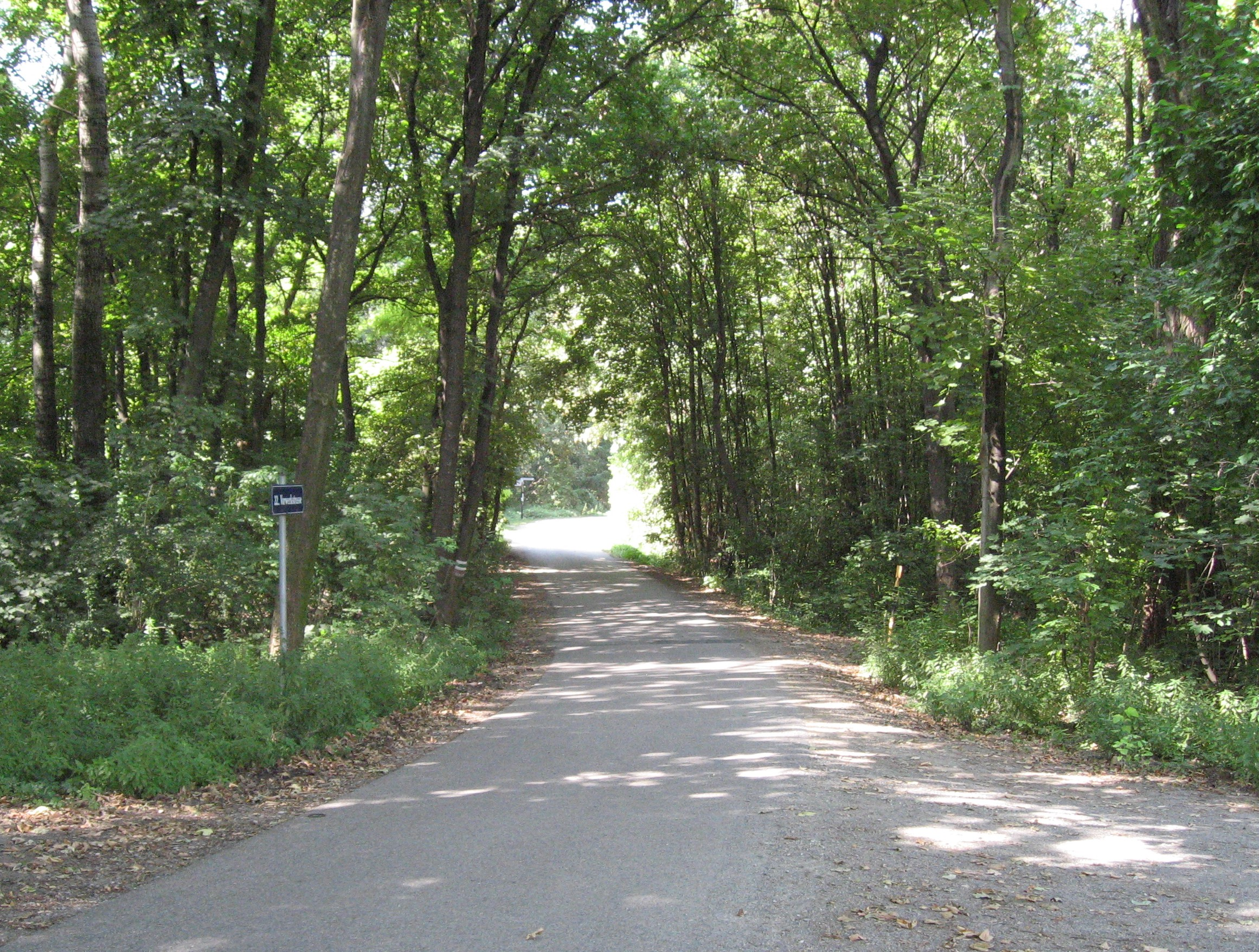 Vorwerkstraße in Wien Donaustadt, führt durch die Lobau